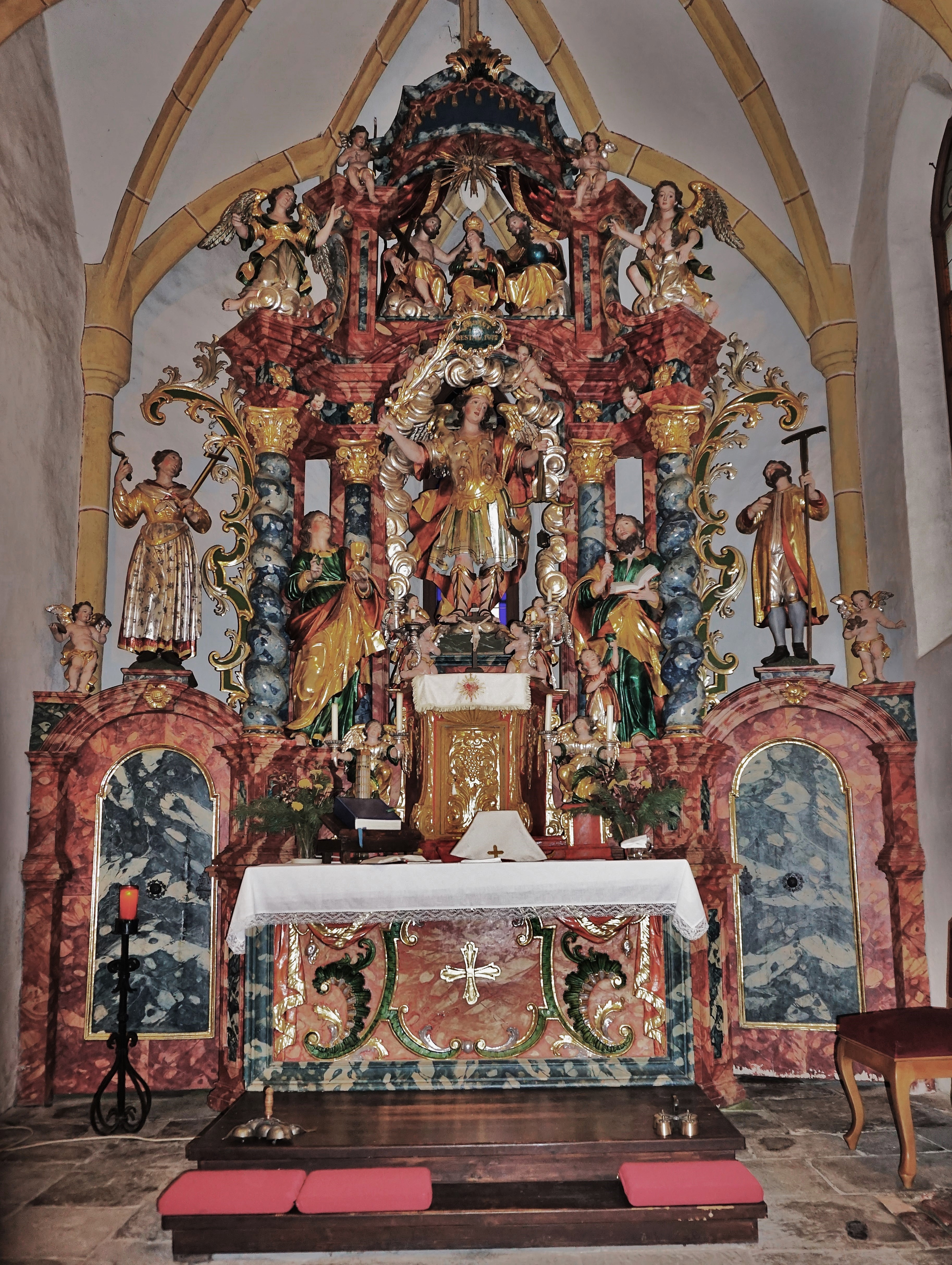 Kath. Filialkirche St. Michael in Gösseling, der Hochaltar